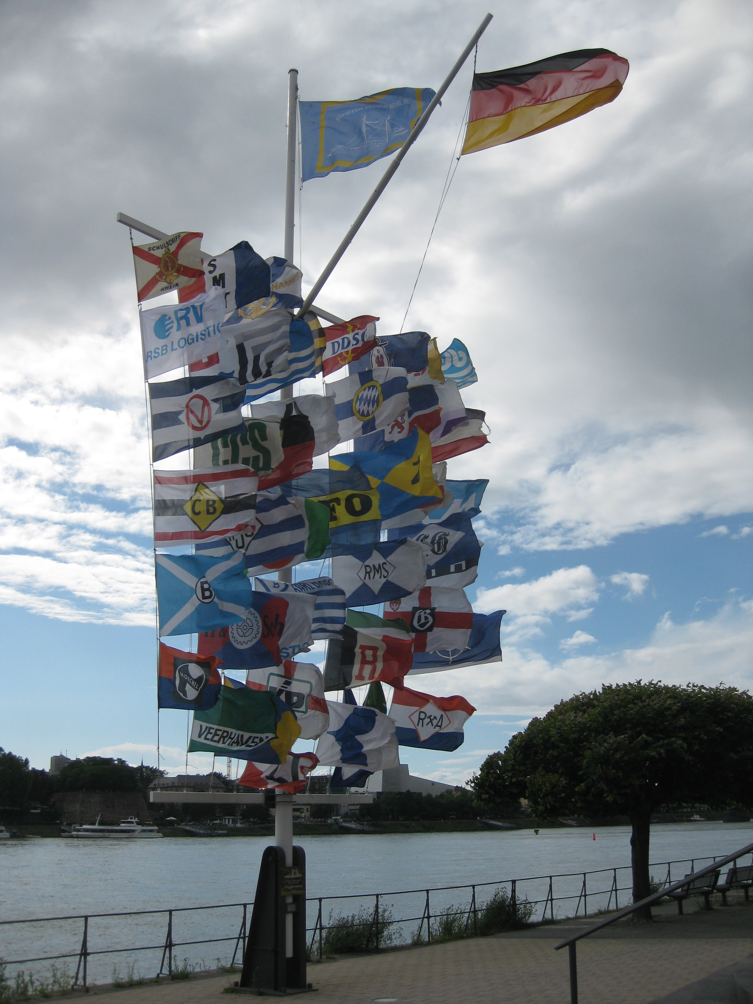 Bonn-Beuel-Mitte, Rheinpromenade, Flaggenmast des Schiffer-Vereins Beuel 1862 e.V. am Nepomukplatz. Er ist zwölf Meter hoch und fünf Meter breit. Im Mai 1987 wurde er -an anderer Stelle- anlässlich des 125-jährigen Bestehens des Vereins errichtet. Nach erfolgten Restaurierung wurde der Mast 2008 an seinem derzeitigen Standort aufgestellt.